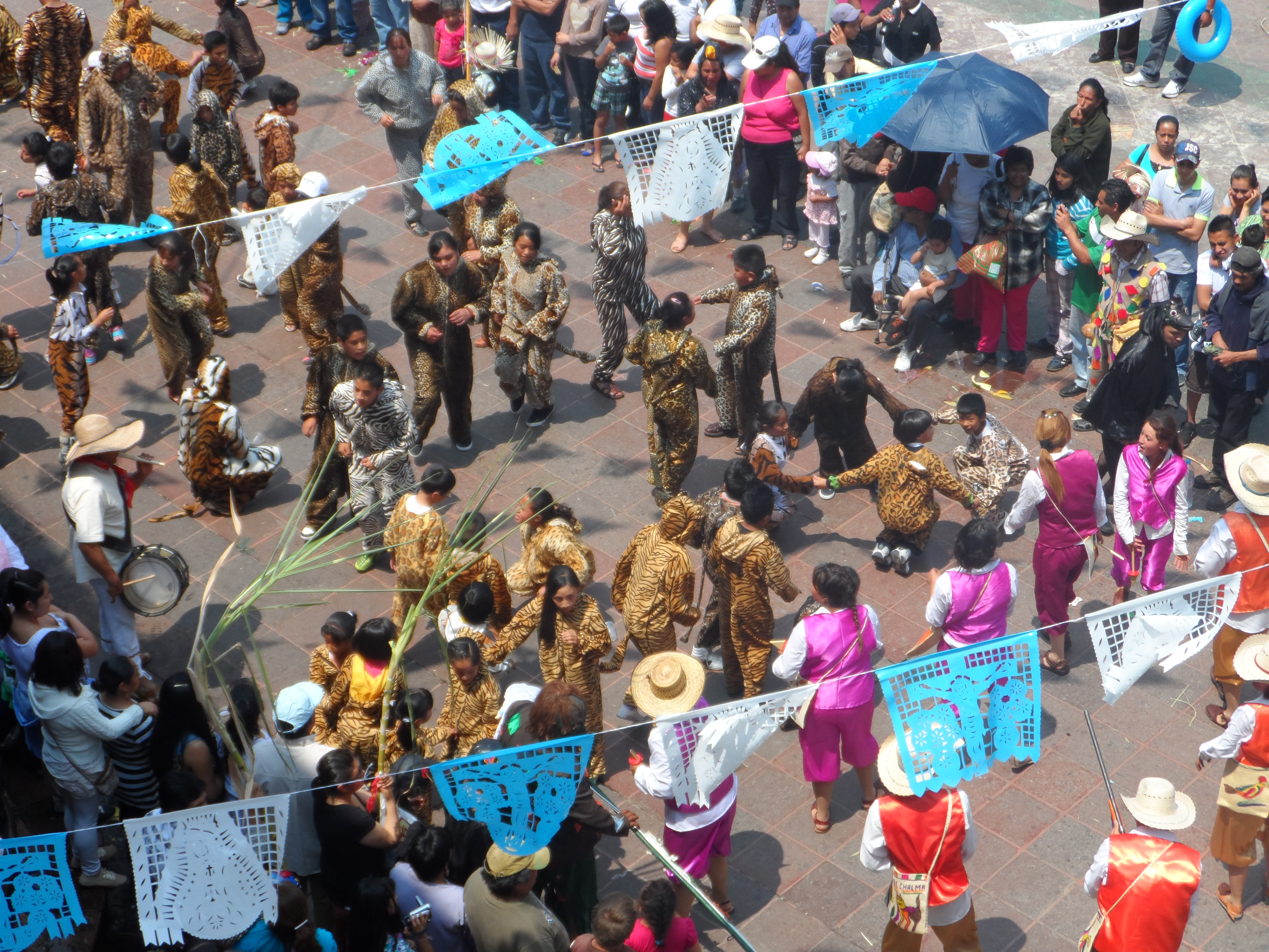 lobos